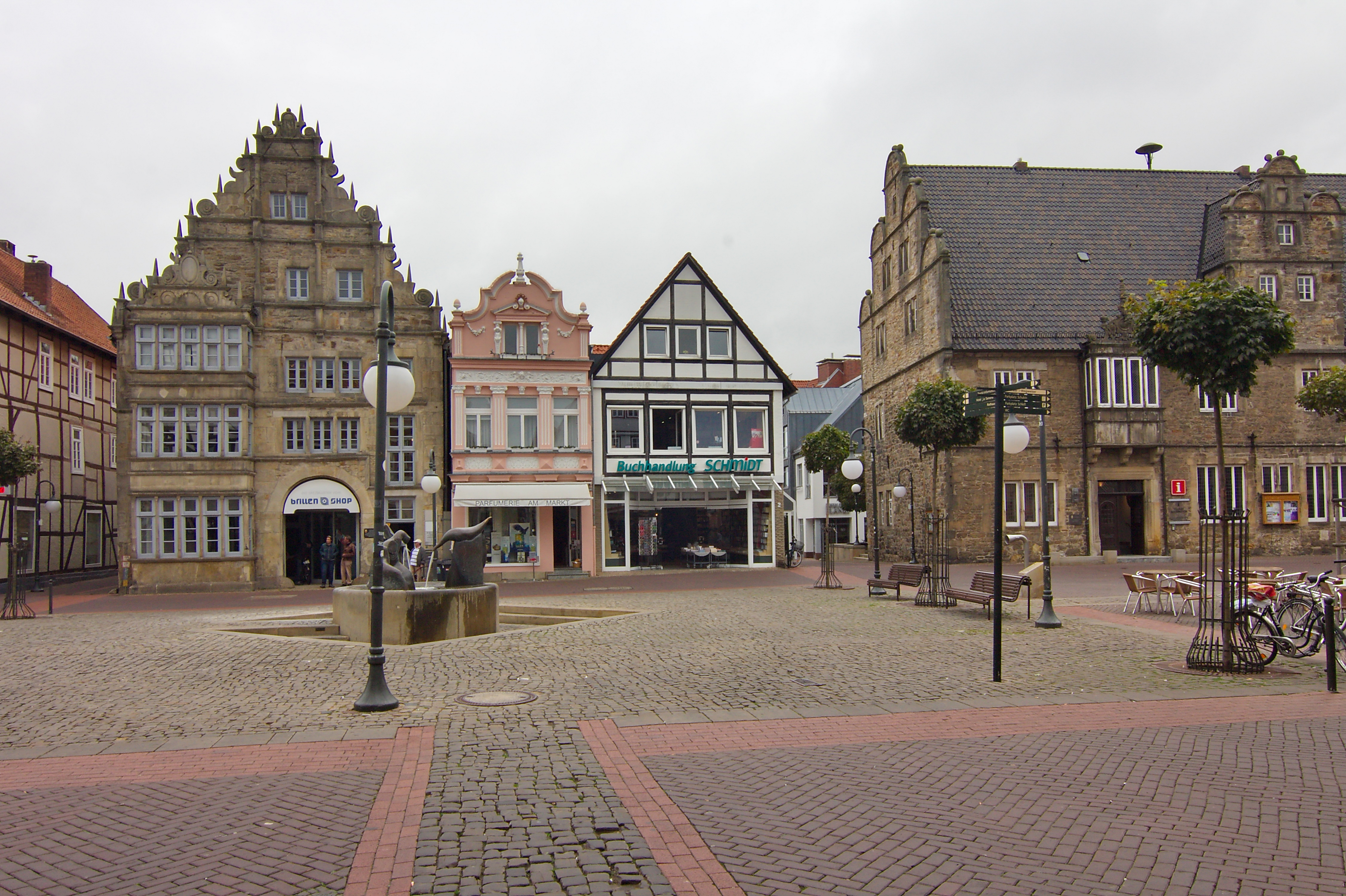 Der Marktplatz in Stadthagen, Niedersachsen, Deutschland.